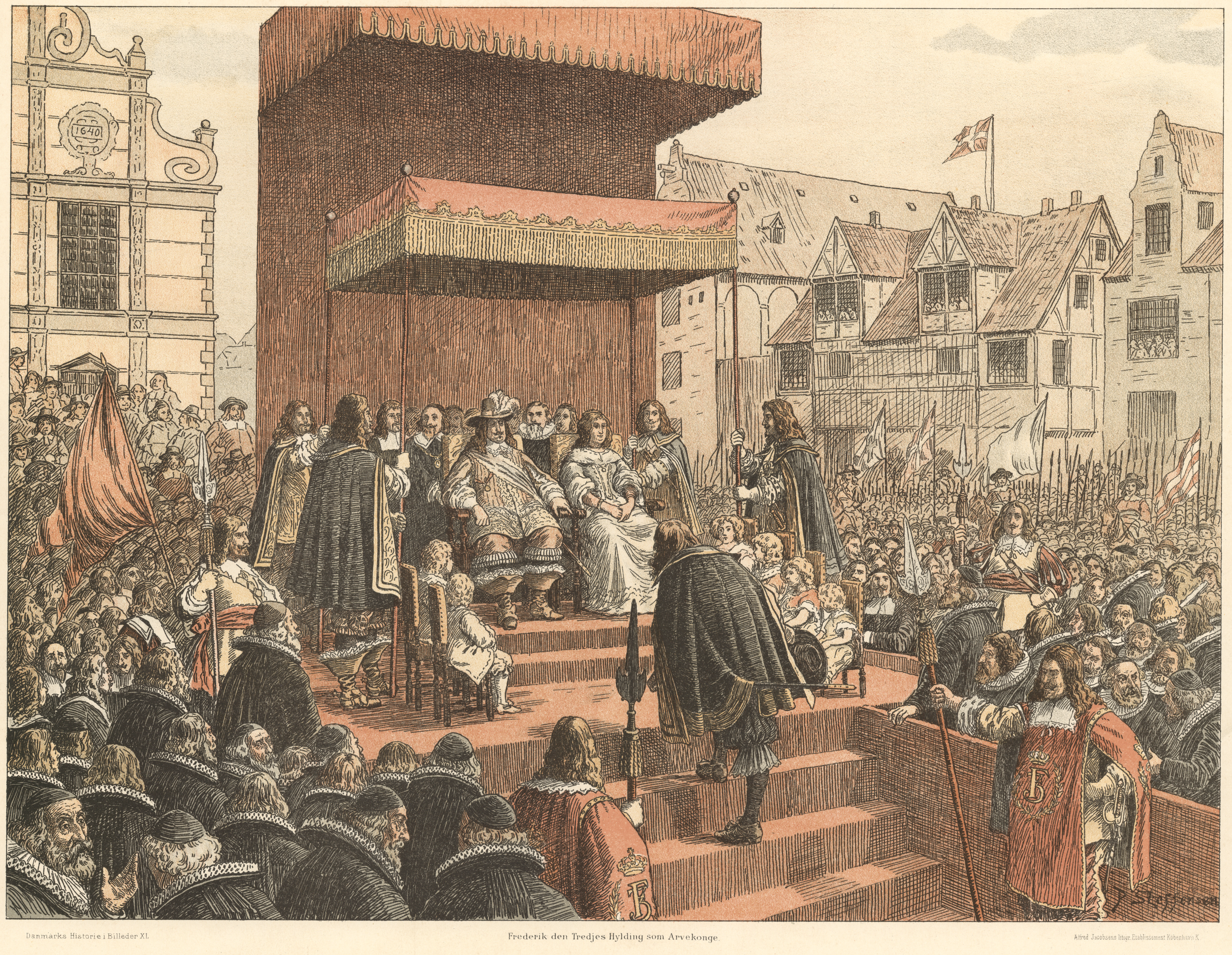 Danmarks Historie i Billeder. XL: Frederik den Tredies hyldning som arvekonge. Farvelitografi på papir opklæbet på pap. Nederst: Sign. P. Steffensen. Danmarks Historie i Billeder XL. Frederik den Tredjes Hylding som Arvekonge. Alfred Jacobsens litogr. Etablissement, København K. Samlingen omfatter 50 billeder, mus.nr. 17.001-17.049. Nr. VI og L mangler. Samlingen er udgivet i 1898, se V.E. Clausen: Folkelig grafik i Skandinavien, 1973 s. 144. 70.9 Cl f. Udstillet i juli-august 1906 iflg. årsberetning 1906-07. 1 dublet, er modtaget fra N. Zahles Gymnasieskole i november 1979 tillige med 2 prøvetryk af billederne fra Lærerstandens Adresseavis, 2. juni 1892, med foromtale af billederne.